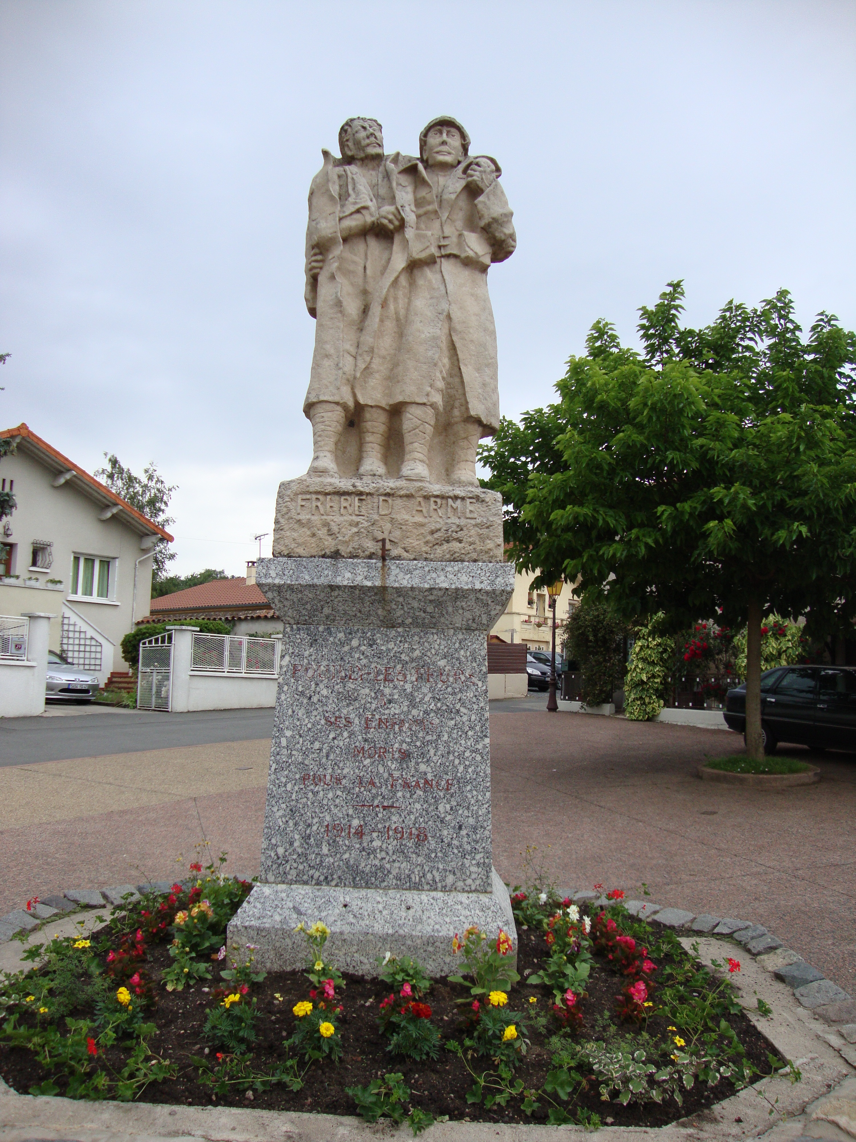 Pouilly-lès-Feurs (Loire, Fr) monument aux morts